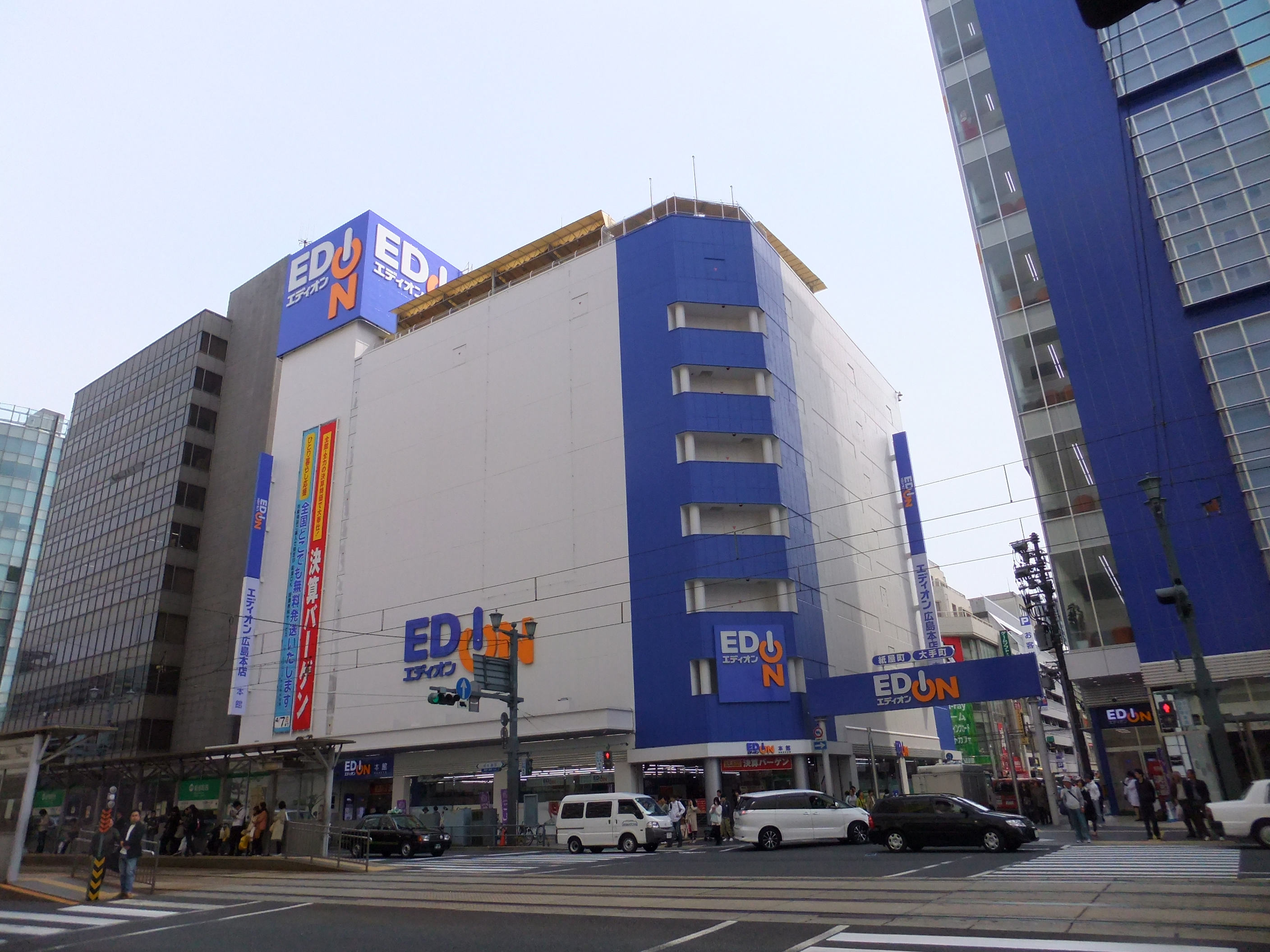 エディオン広島本店